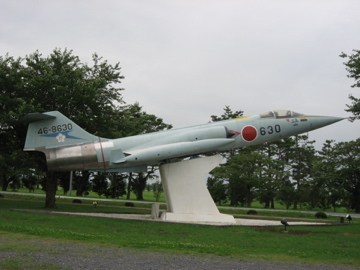 航空自衛隊百里基地で撮影したF-104戦闘機。